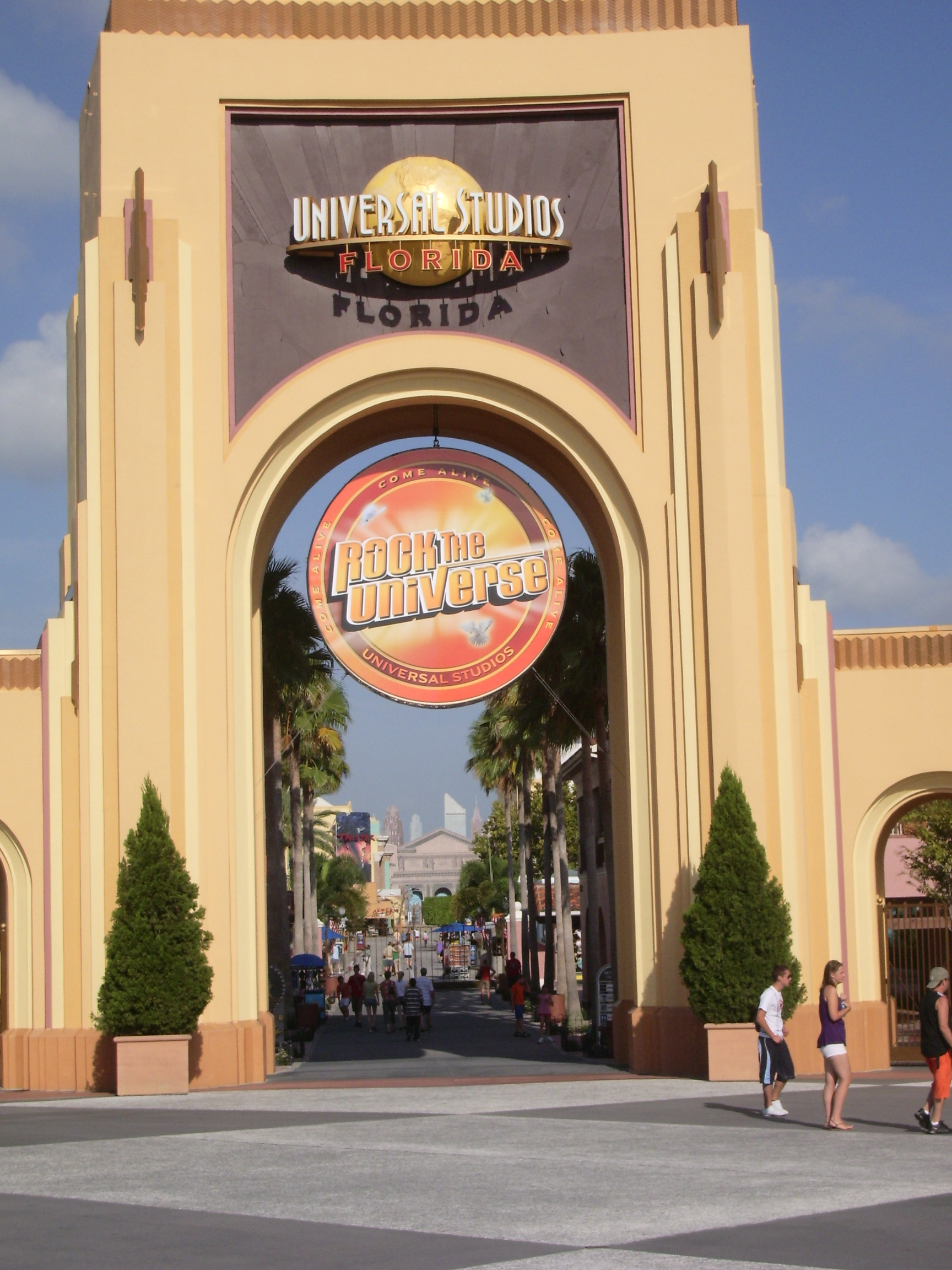 Univeral Orlando Resort